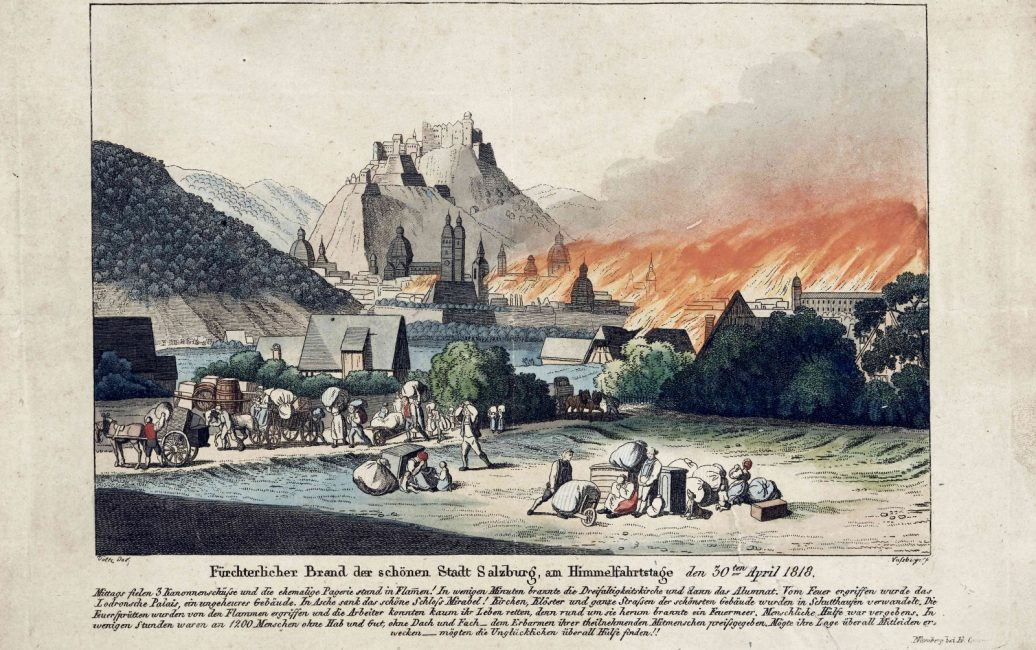 Stich coloriert - Stadtbrand Salzburg